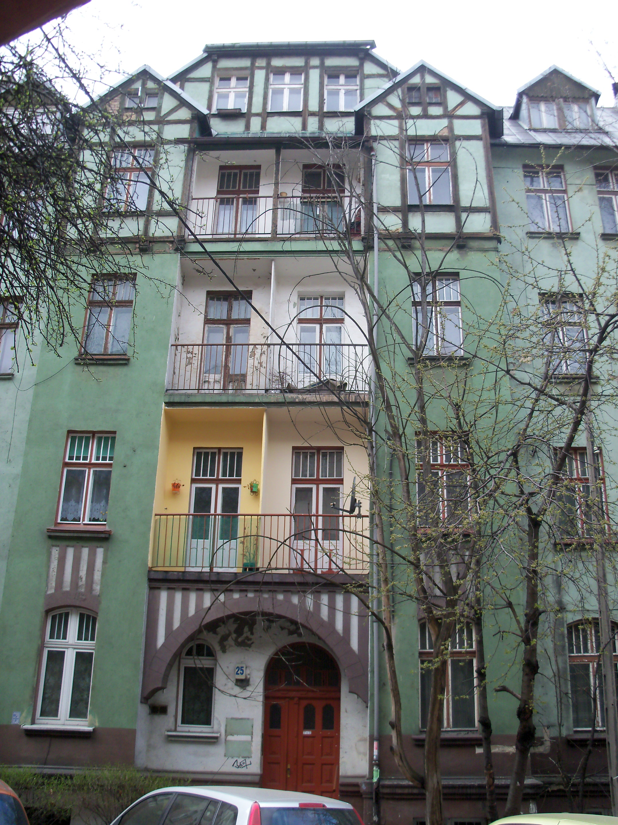 Katowice - budynek przy ul. Sienkiewicza 25